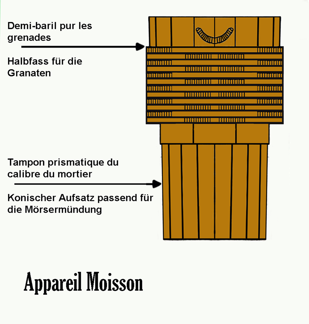 Appareil Moisson pur les mortiers lisse modèle 1839